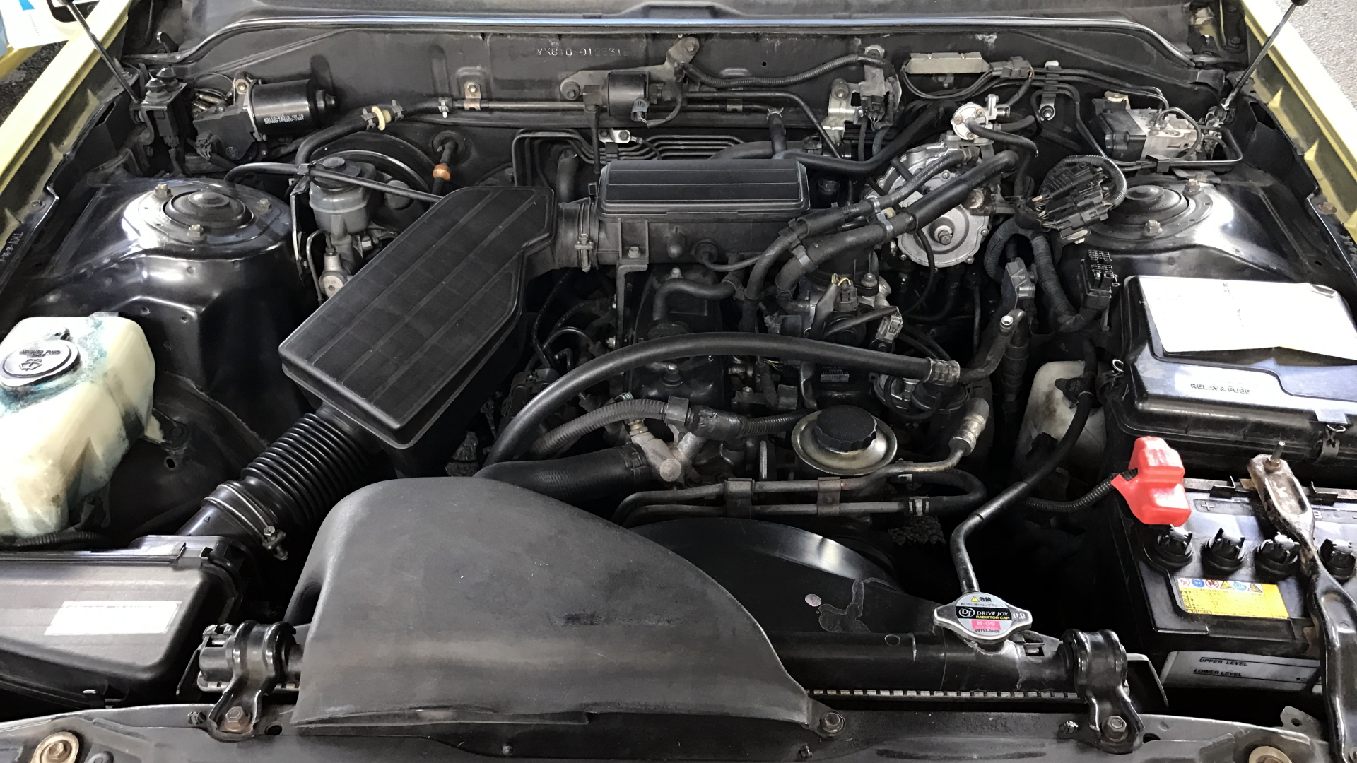 トヨタ・クラウンセダン・トヨタ・クラウンコンフォート・トヨタ・コンフォートの3Y-PEエンジン。